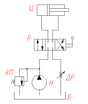 Гидросхема с последовательно включённым дросселем